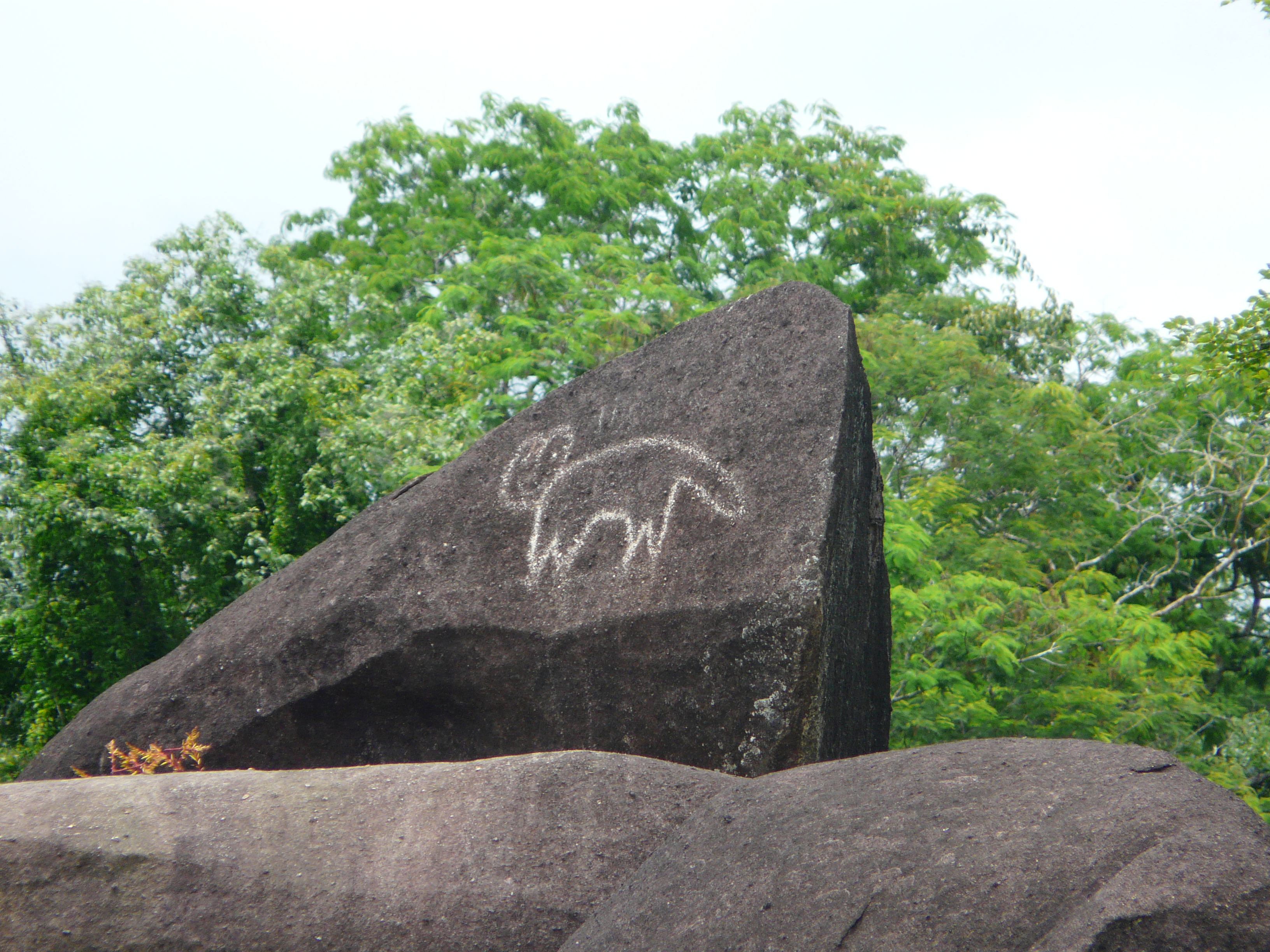 Dibujo rupestre de los E'ñepá en la comunidad de Colorado.